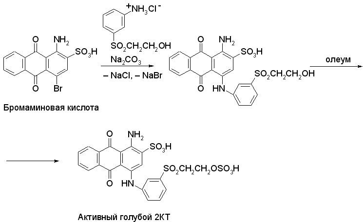 Схема синтеза активного винилсульфонового красителя Активного голубого 2КТ